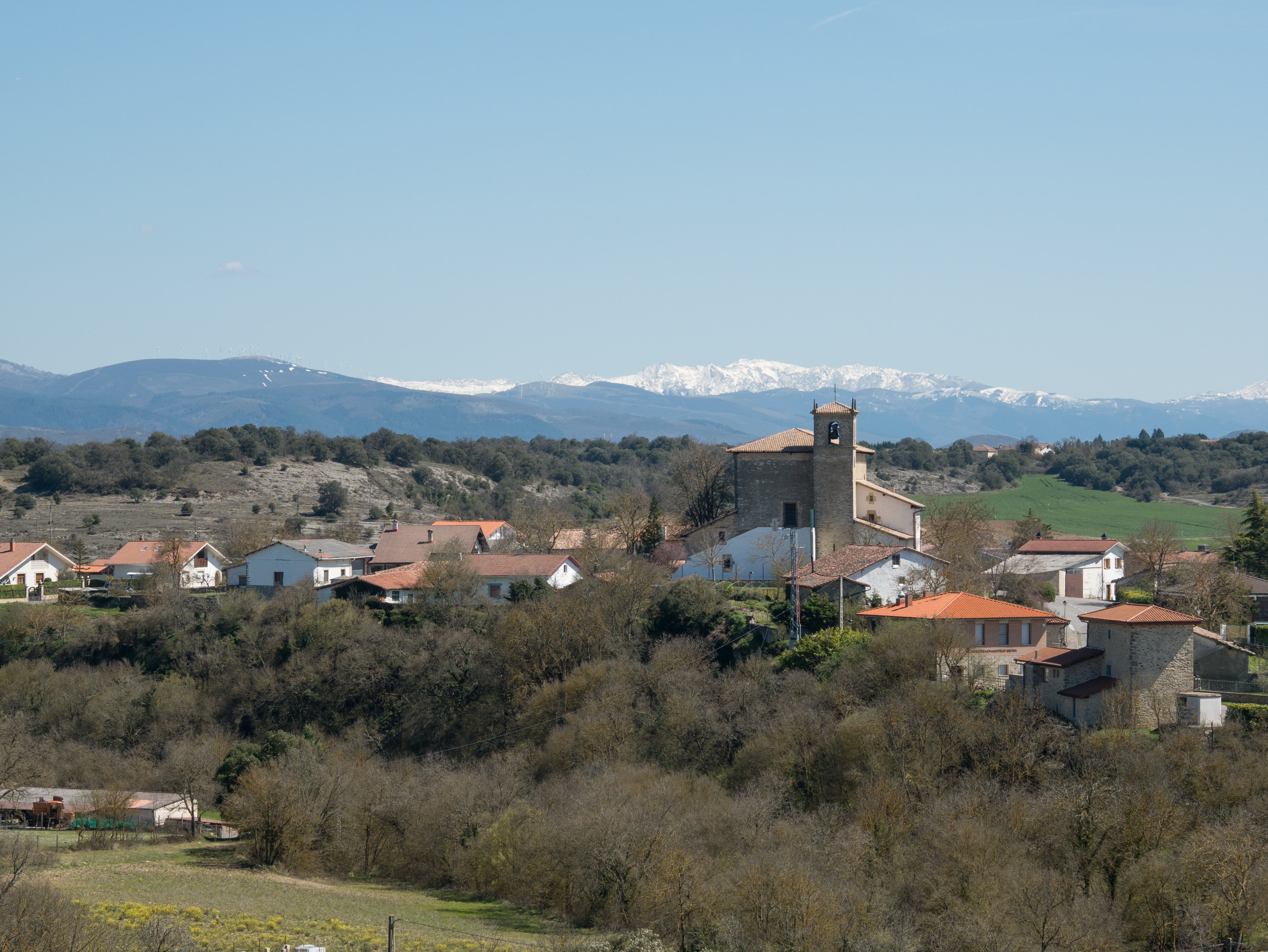 Apodaka. En el fondo, las Sierras de Aizkorri y Elgea. Zigoitia, Álava, País Vasco, España